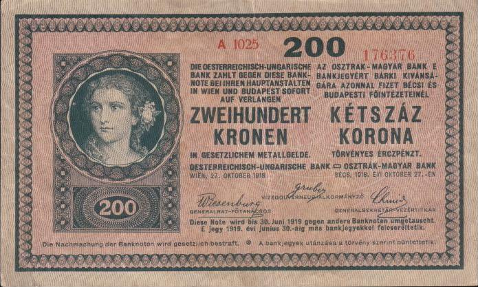 200 Austro-Hungarian Krone/korona (1918) - obverse